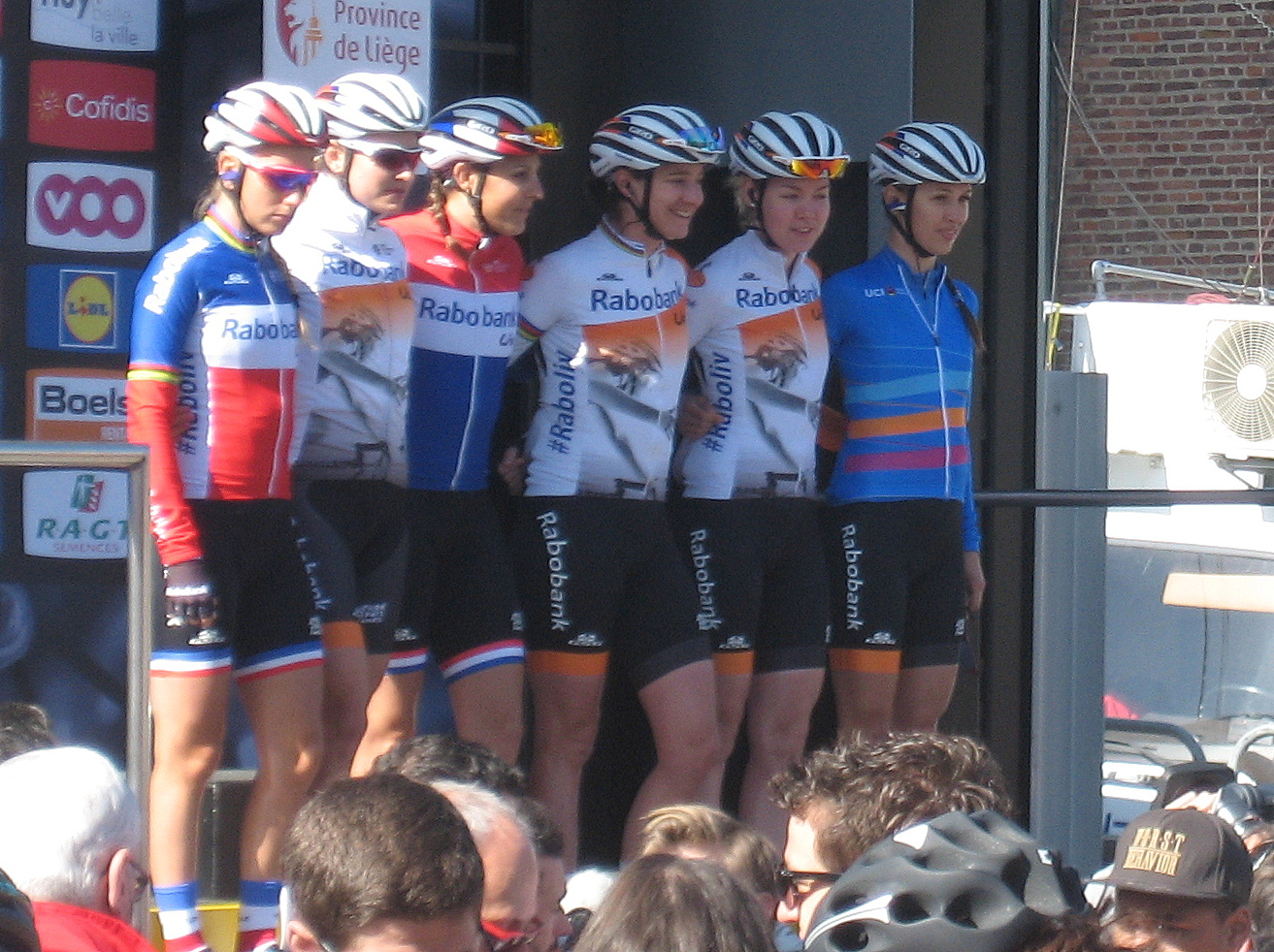 Rabo-Liv voor start Waalse Pijl 2016